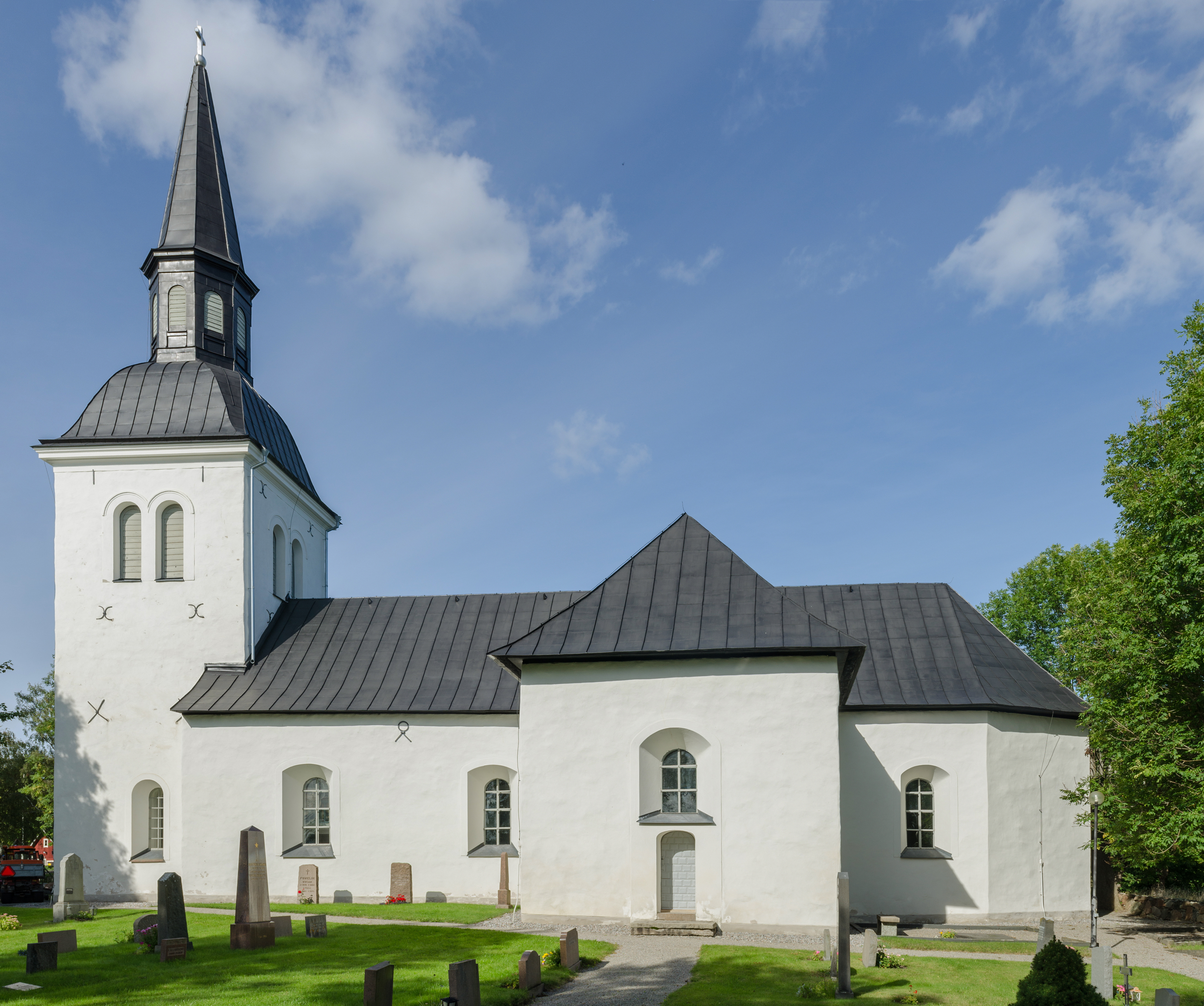 Skå church. Ekerö Municipality, Stockholm County. Church of Sweden, Diocese of Stockholm, Färingsö Parish. This image was created with Hugin.